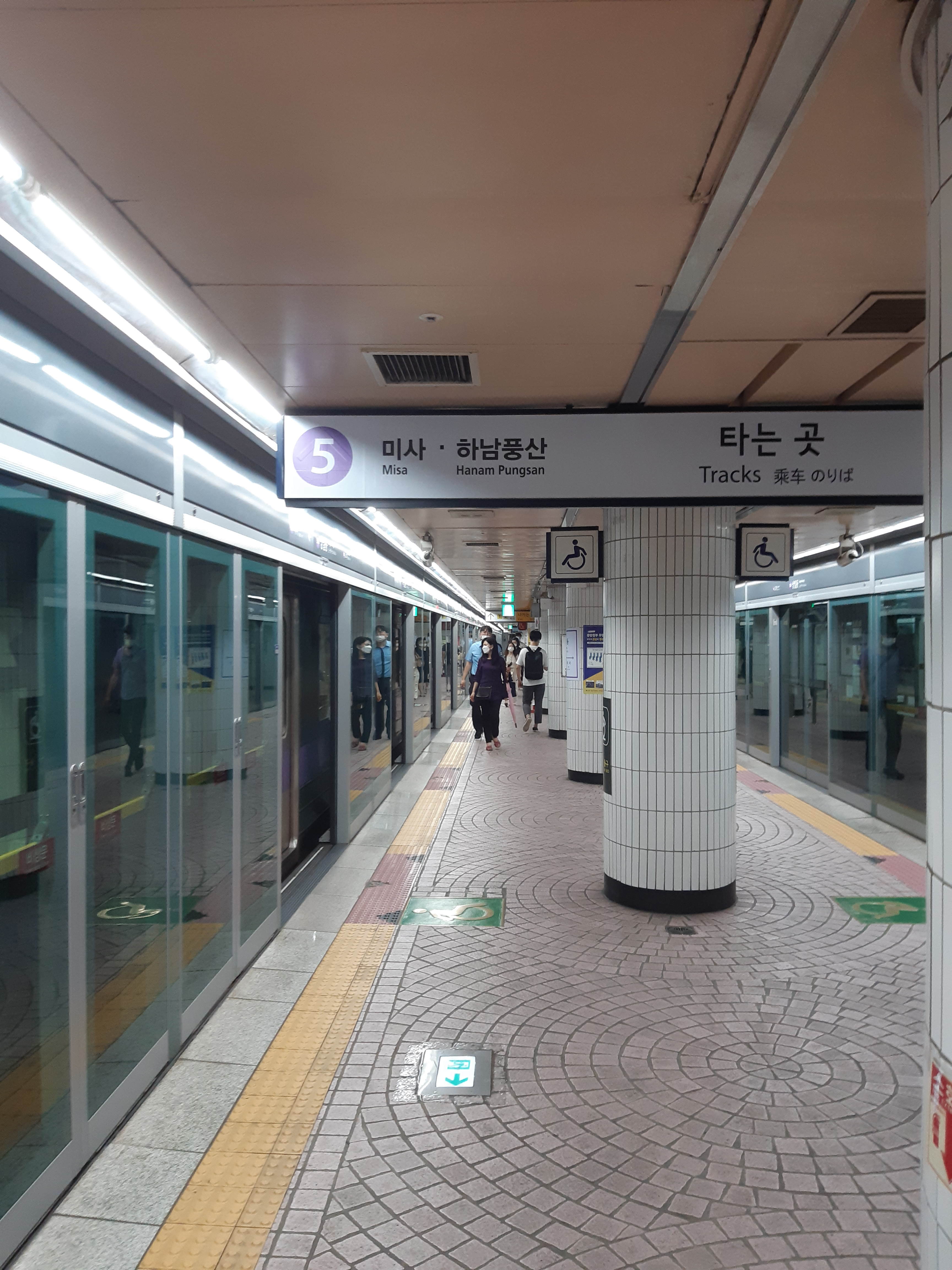 상일동역 승강장